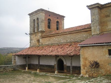 Foto de la iglesia